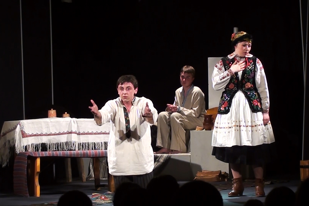 Вистава "По-чучому велінню" за п'єсою Марка Кропивницького